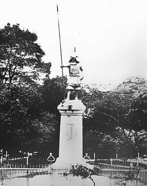 戦前の徳島中央公園にあった蜂須賀正勝像。（現在はない）